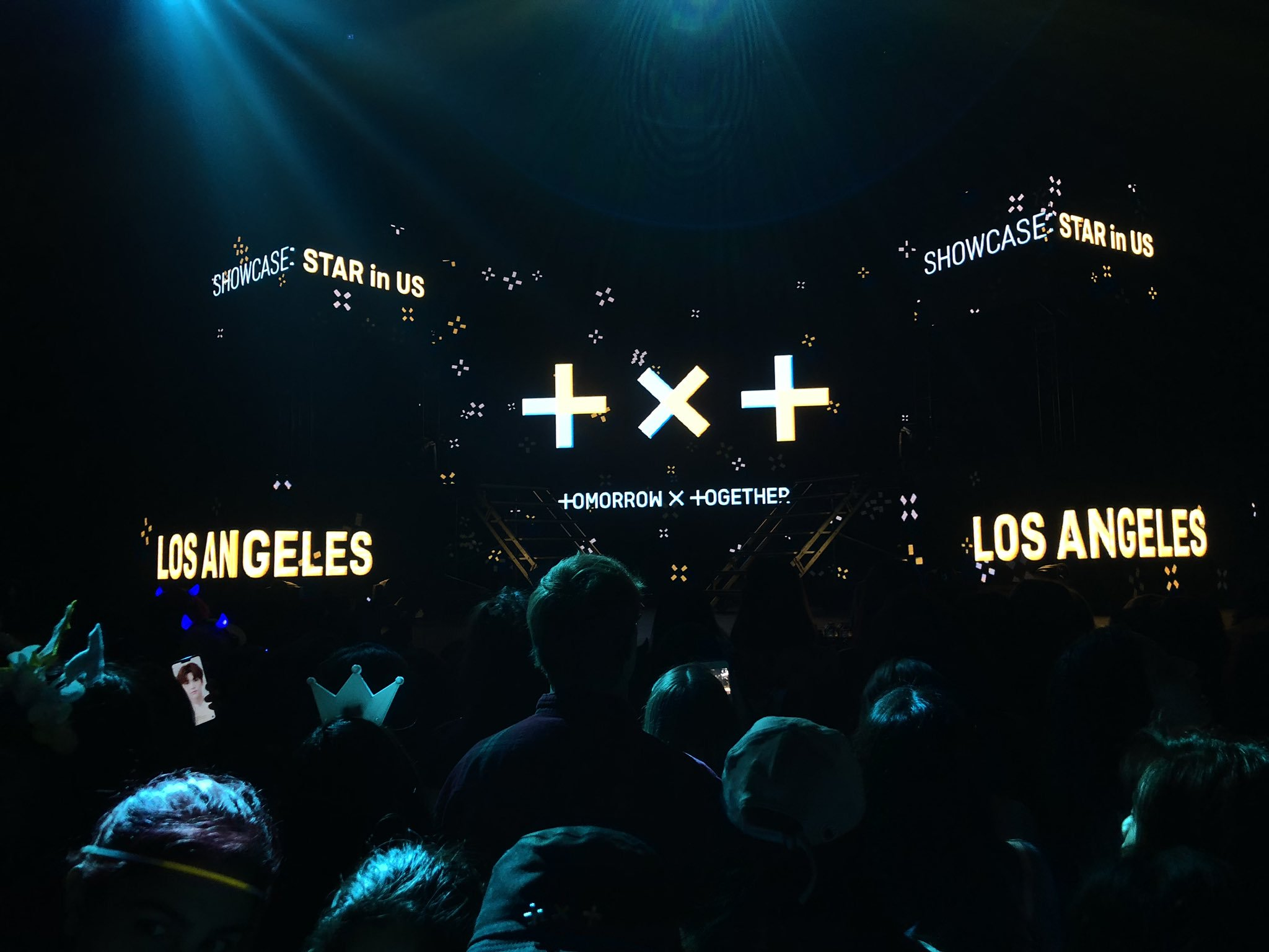 Evento de Showcase no dia 24 de maio do grupo Tomorrow x Together na cidade de Los Angeles, EUA.